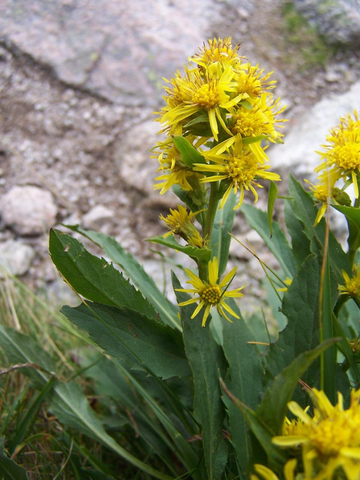 Solidago alpestris = S. viragaurea subsp. apestris (pl. nawłoć alpejska), habitat: Tatra Mountains, Pośrednia Turnia